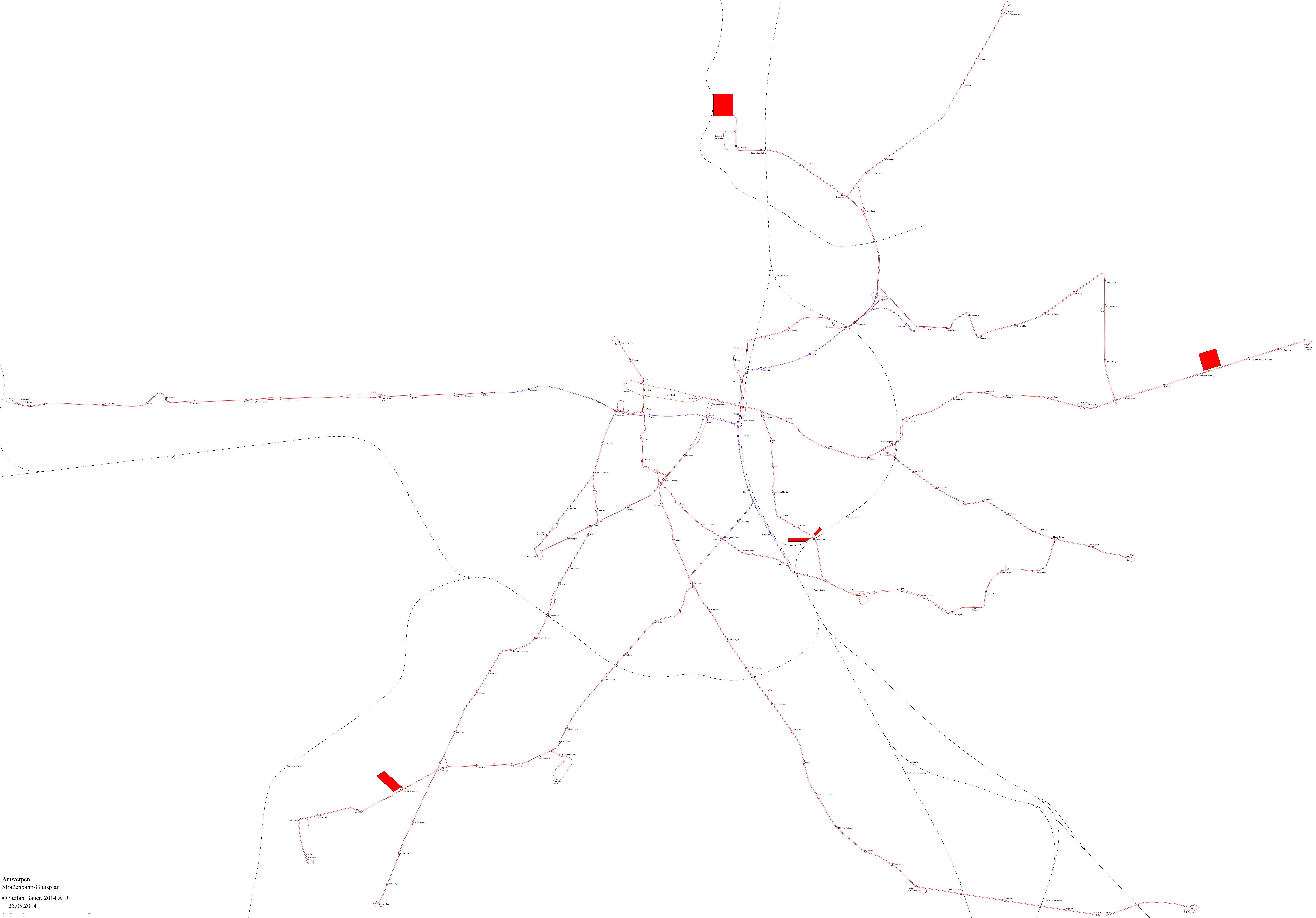 Sporenplan van het Antwerpse tramnetwerk 2014